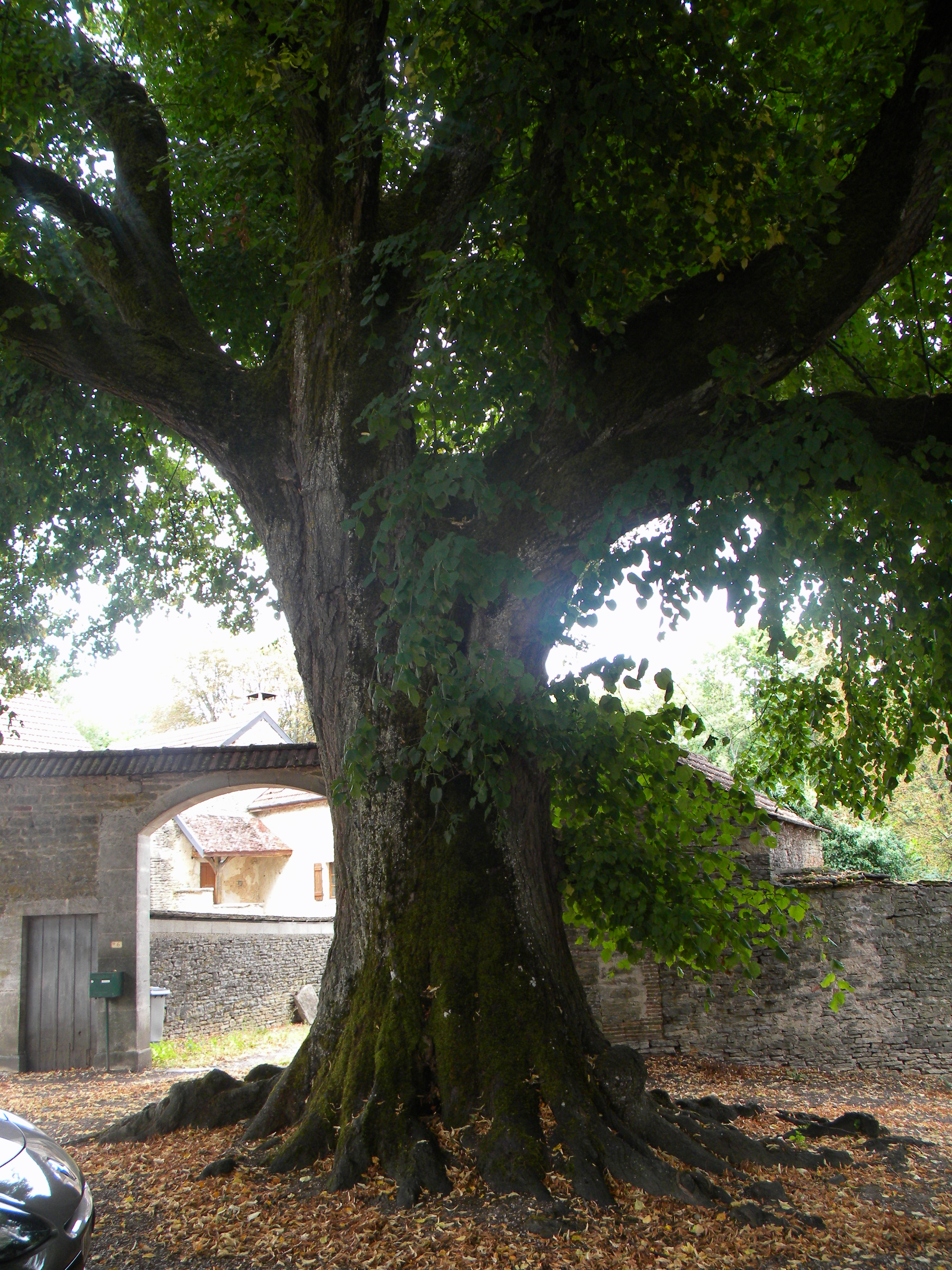 Malnova tilio Collonges-lès-Bévy